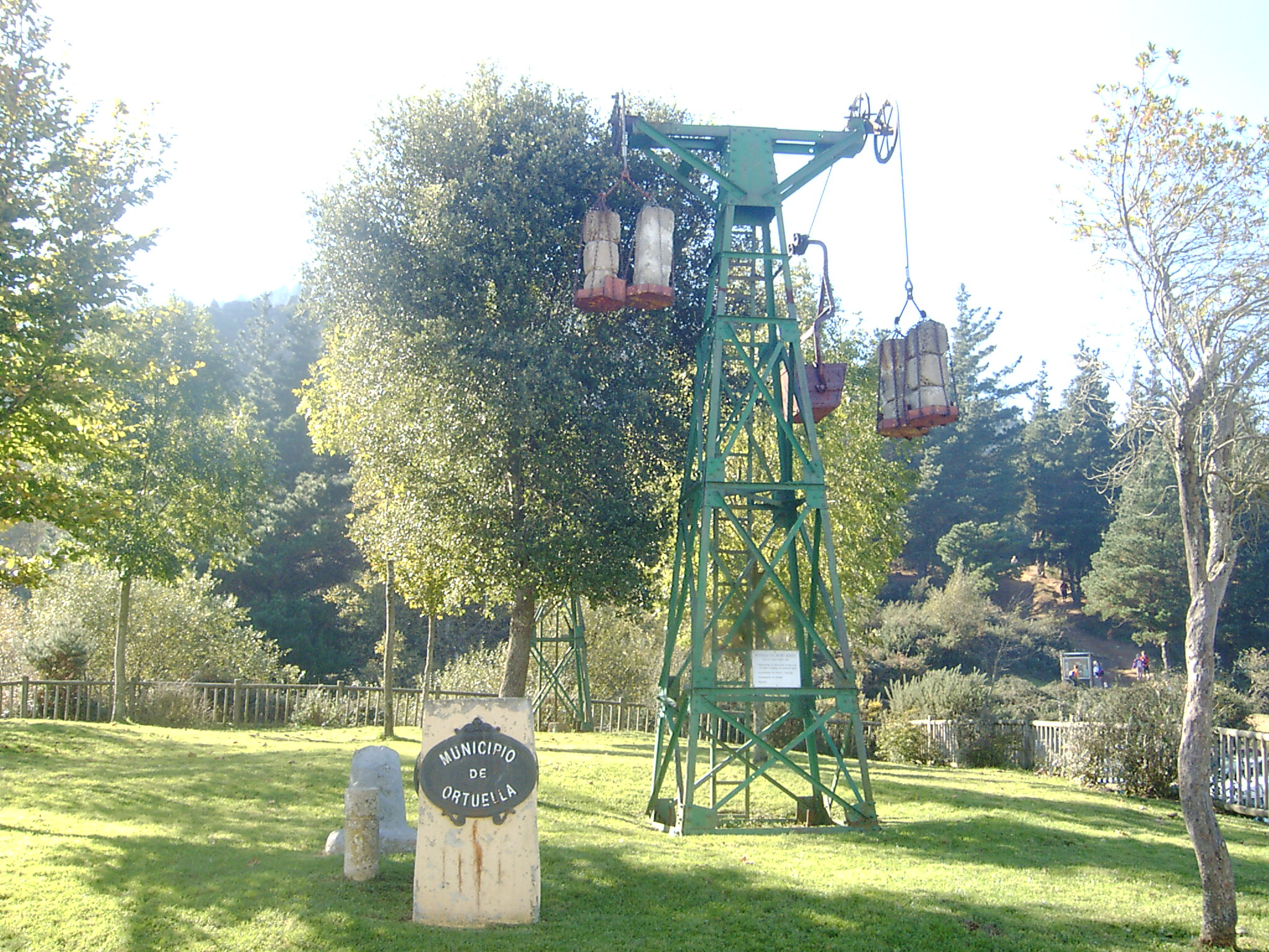 Peñas negras ezagutzeko zentroa